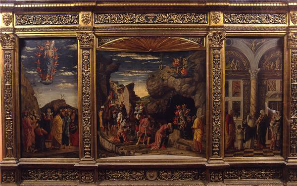 Trittico degli uffizi